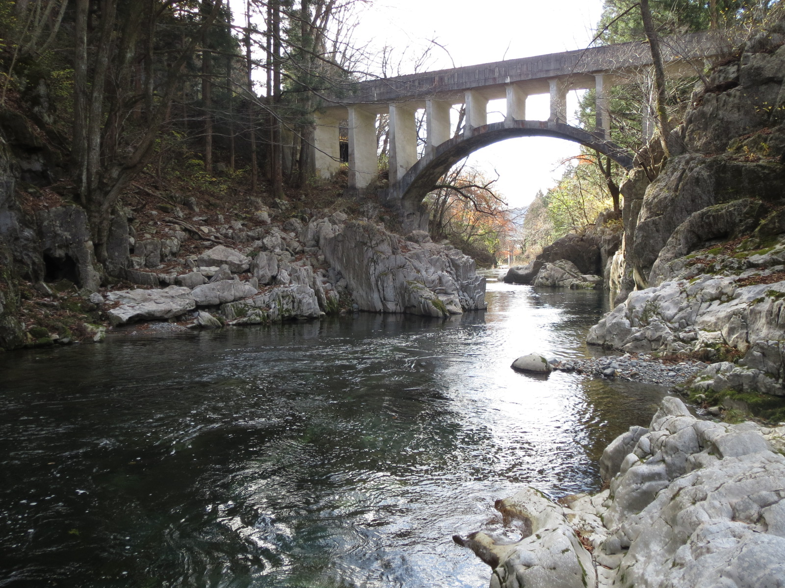 葉山メガネ橋